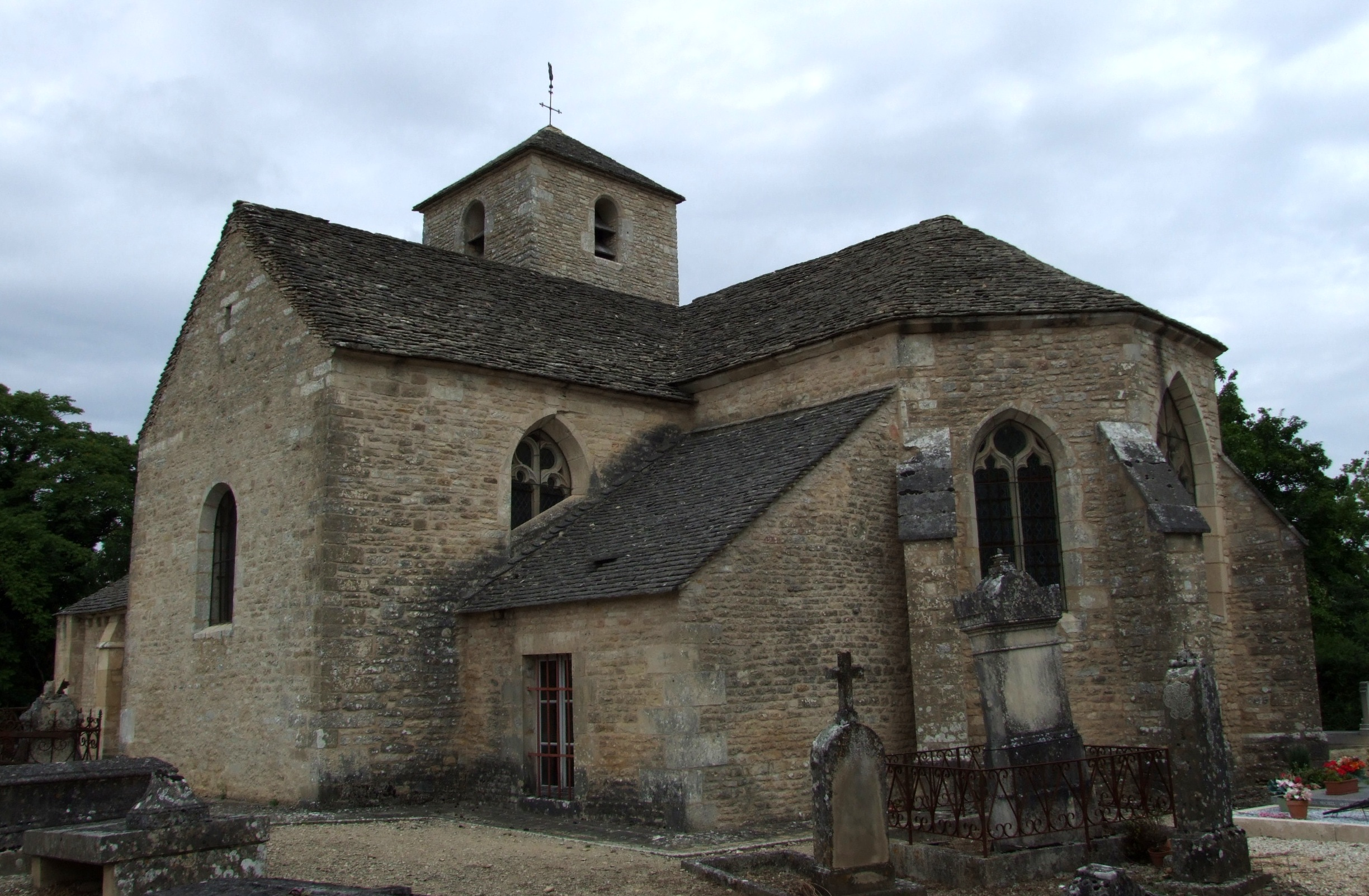 Église Saint-Marcel de Vix, Vix, Côte-d'Or, Bourgogne, FRANCE